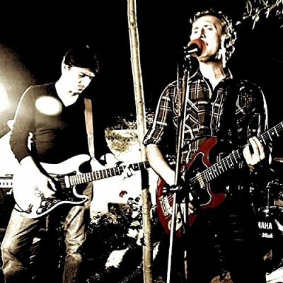 Tarkan Çakır'ın 2013 yılında yayınlanmış olan İstanbul Ataköy isimli tekli albüm kapağı.